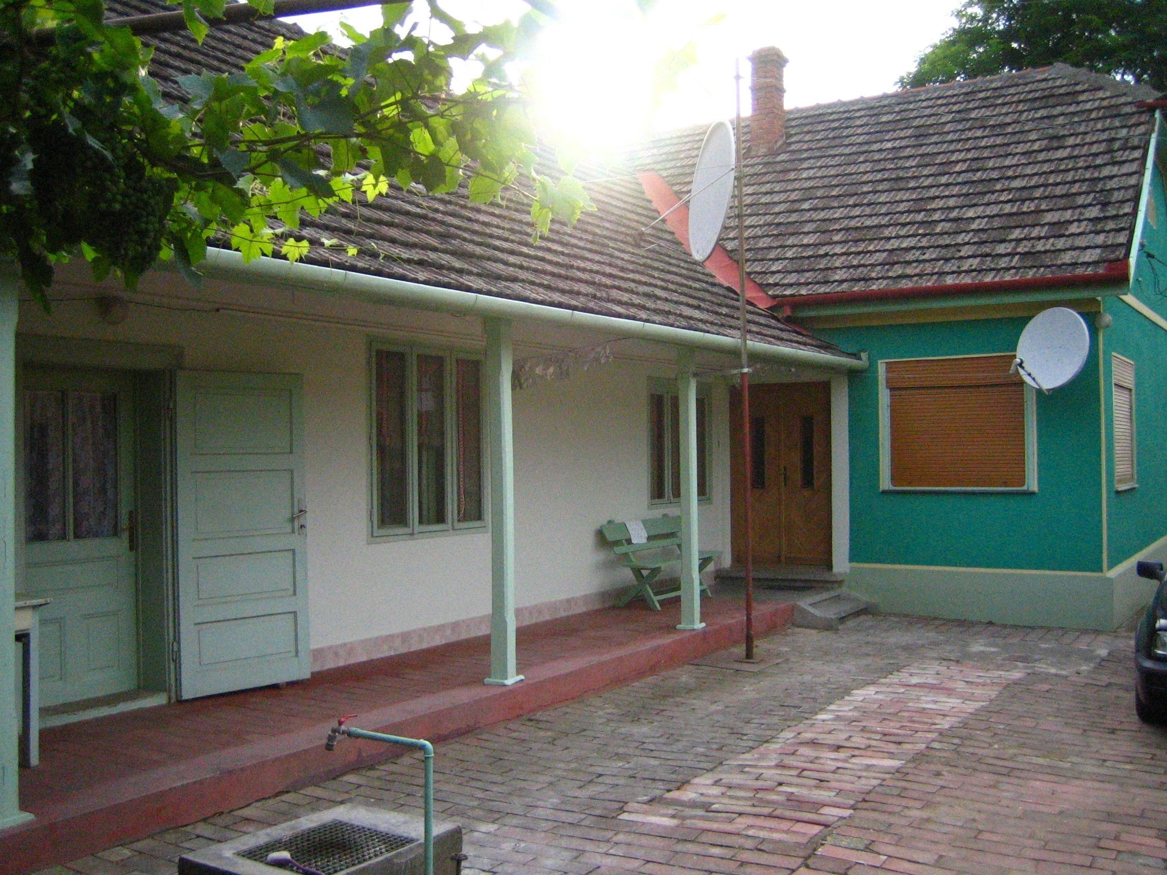 Im Quartier Freidorf von Timisoara, Rumänien: Ansicht im Innenhof von Haus Nr. 107 der Strasse Ion Slavici, in dem der Olympiaschwimmer und Tarzandarsteller Johnny Weissmüller in den ersten Monaten seines Lebens wohnte (Auskunft von Msgr. Pfarrer Wonerth László von der katholischen Kirche Freidorf, wo Johnny Weissmüller getauft wurde). - Foto: Jakob Vetsch, 12. Juli 2010.